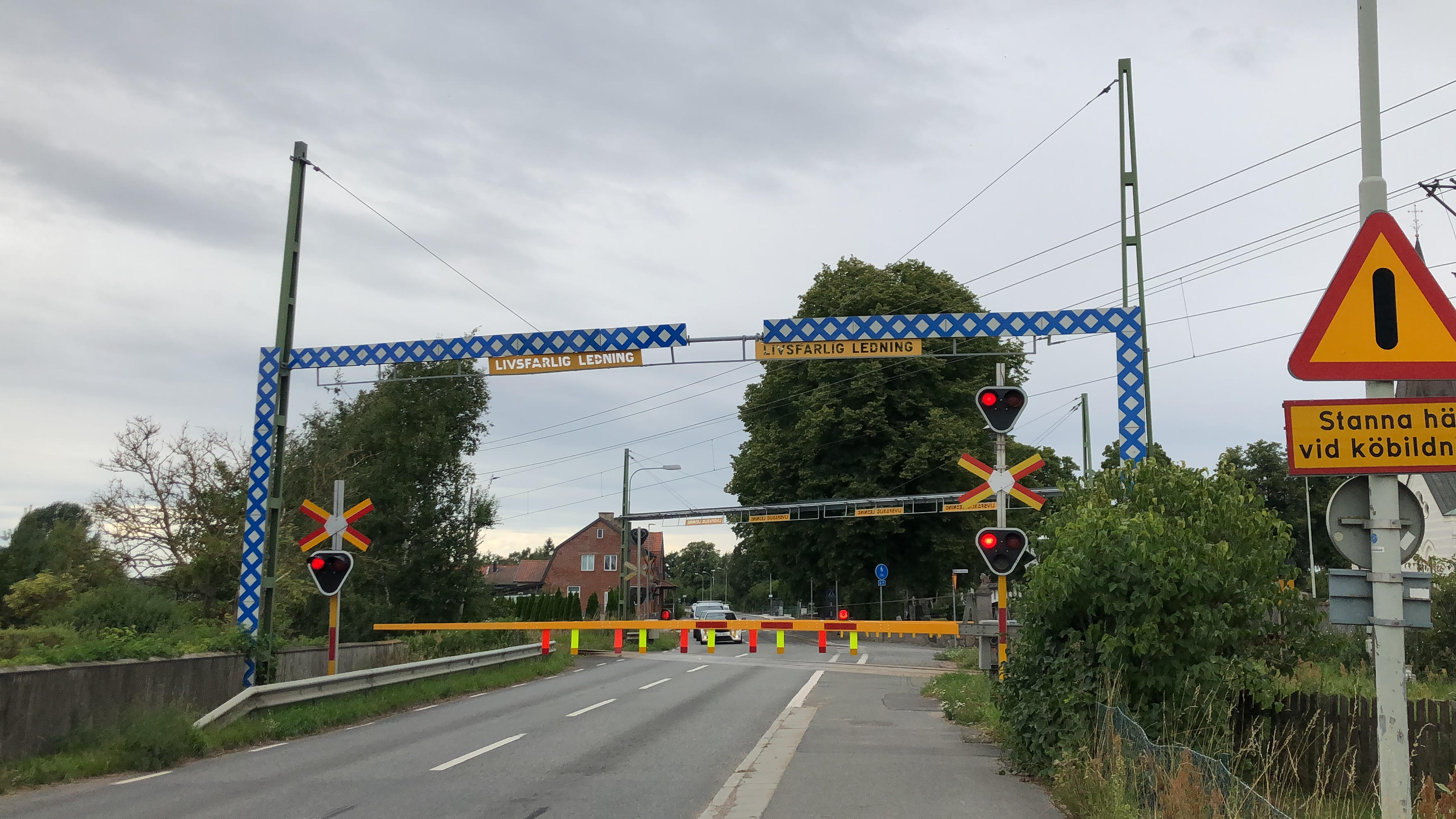 Olycksplatsen 2020